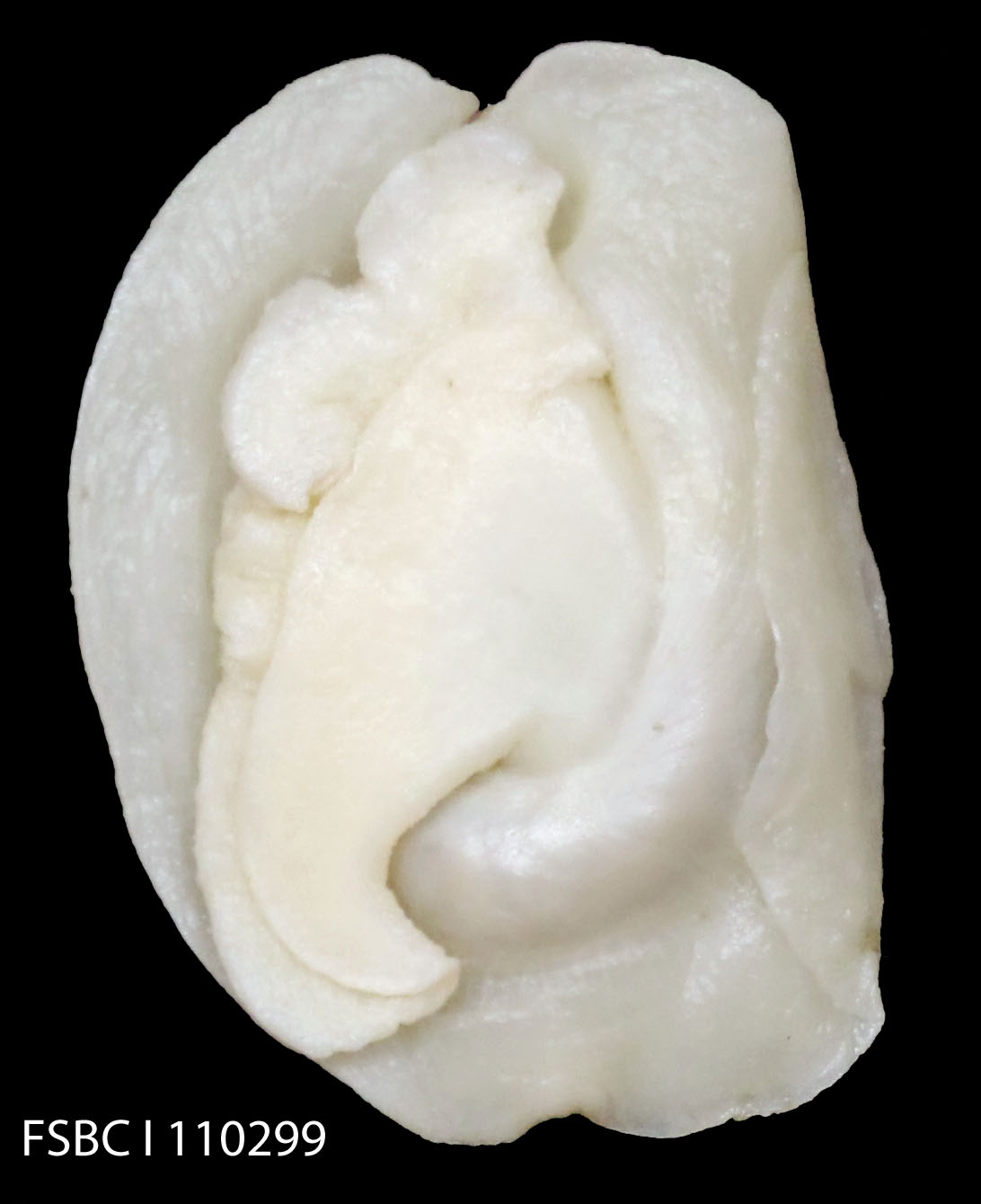 Scientific name: Lamellaria perspicua'